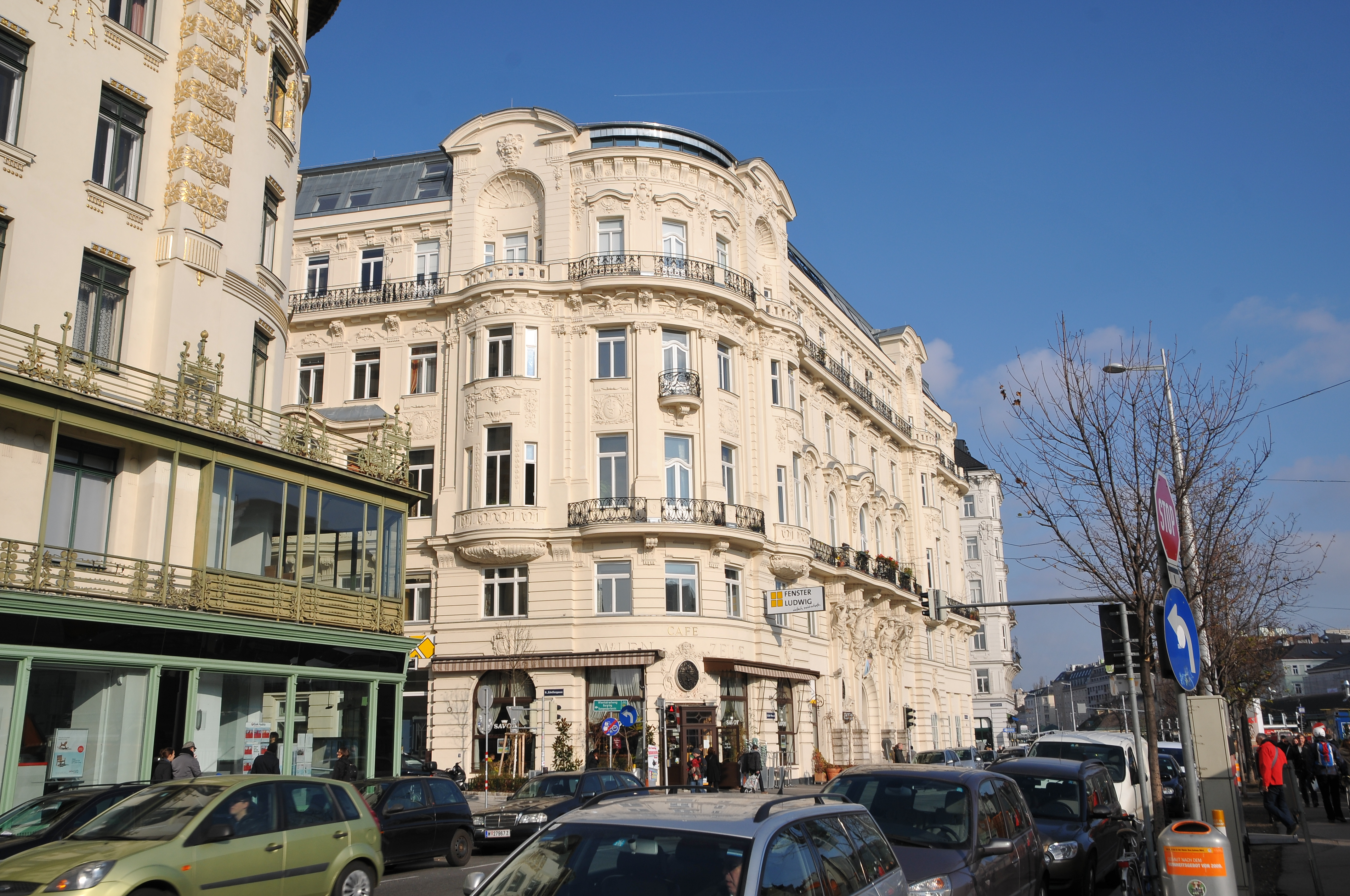 Haus, an der Linken Wienzeile Nr.36, gesehen vom Wiener Naschmarkt.